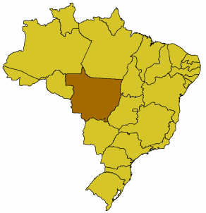 Karte Brasiliens, Mato Grosso hervorgehoben, GFDL nach der Vorlage Bild:Brasilien Bundesstaaten.png